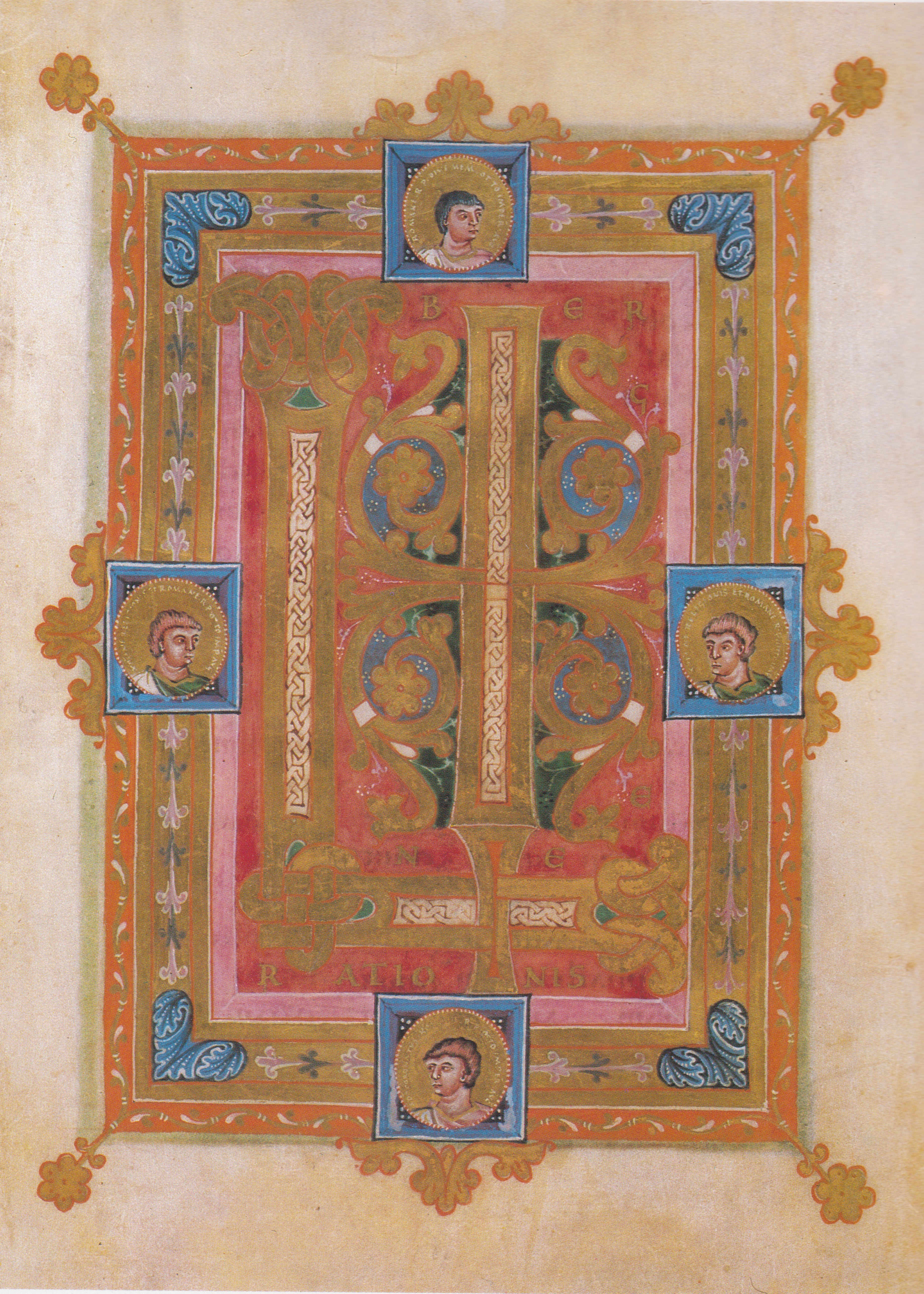 John Rylands Library, Ms. 98, fol. 16r. Initialzierseite zum Matthäusevangelium mit 4 Herrschermedaillons im Rahmen. Buchmalerei des Meisters des Registrum Gregorii, datierbar 996-1002